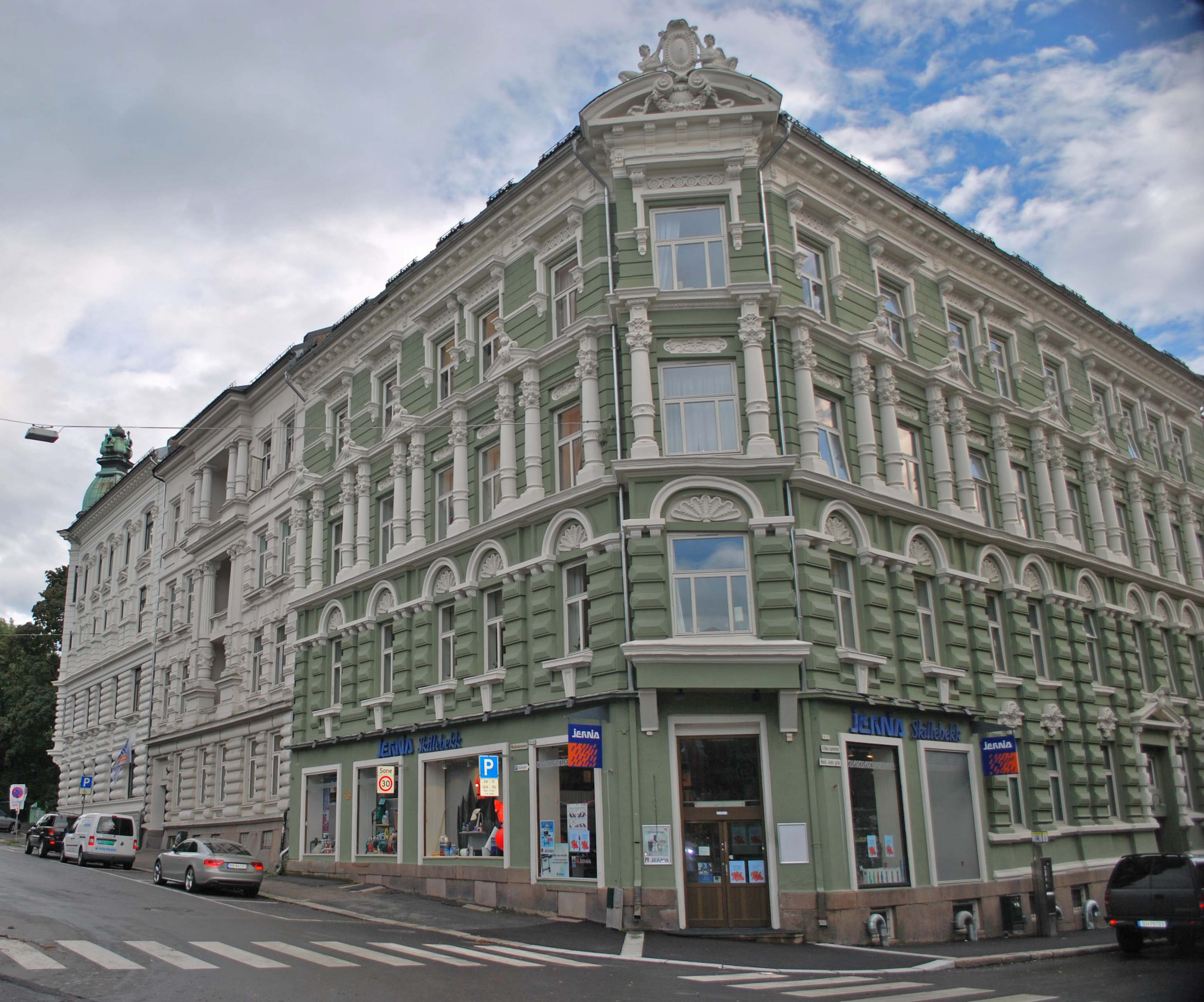 Niels Juels gate 9 på hjørnet og Munkedamsveien 98, Skillebekk